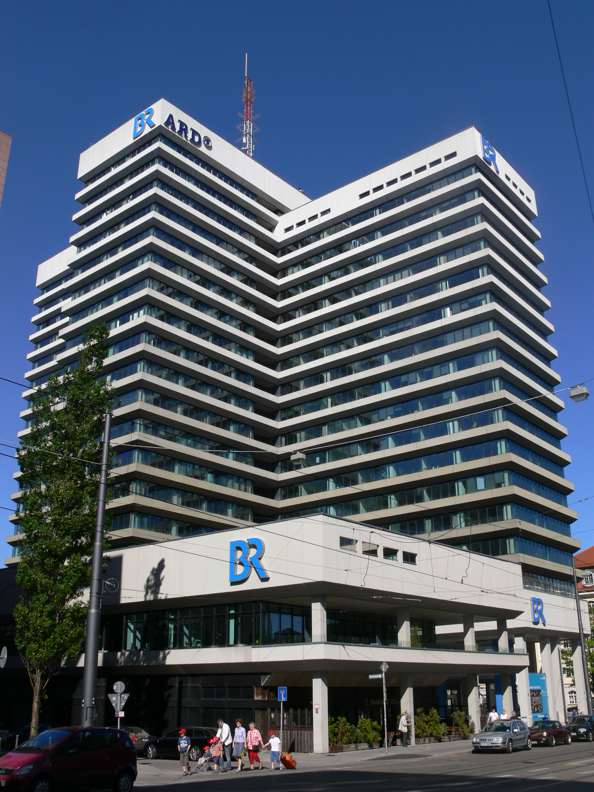 BR-Gebäude, München, Arnulfstraße.